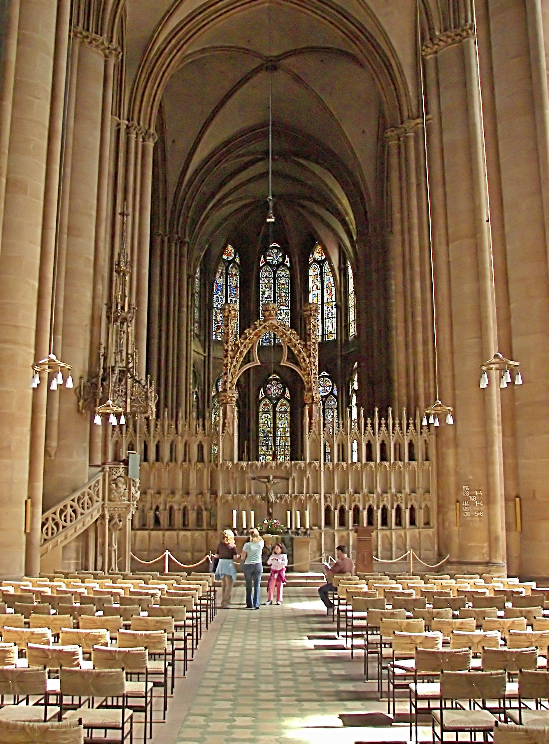 Elisabethkirche in Marburg, selbst fotografiert